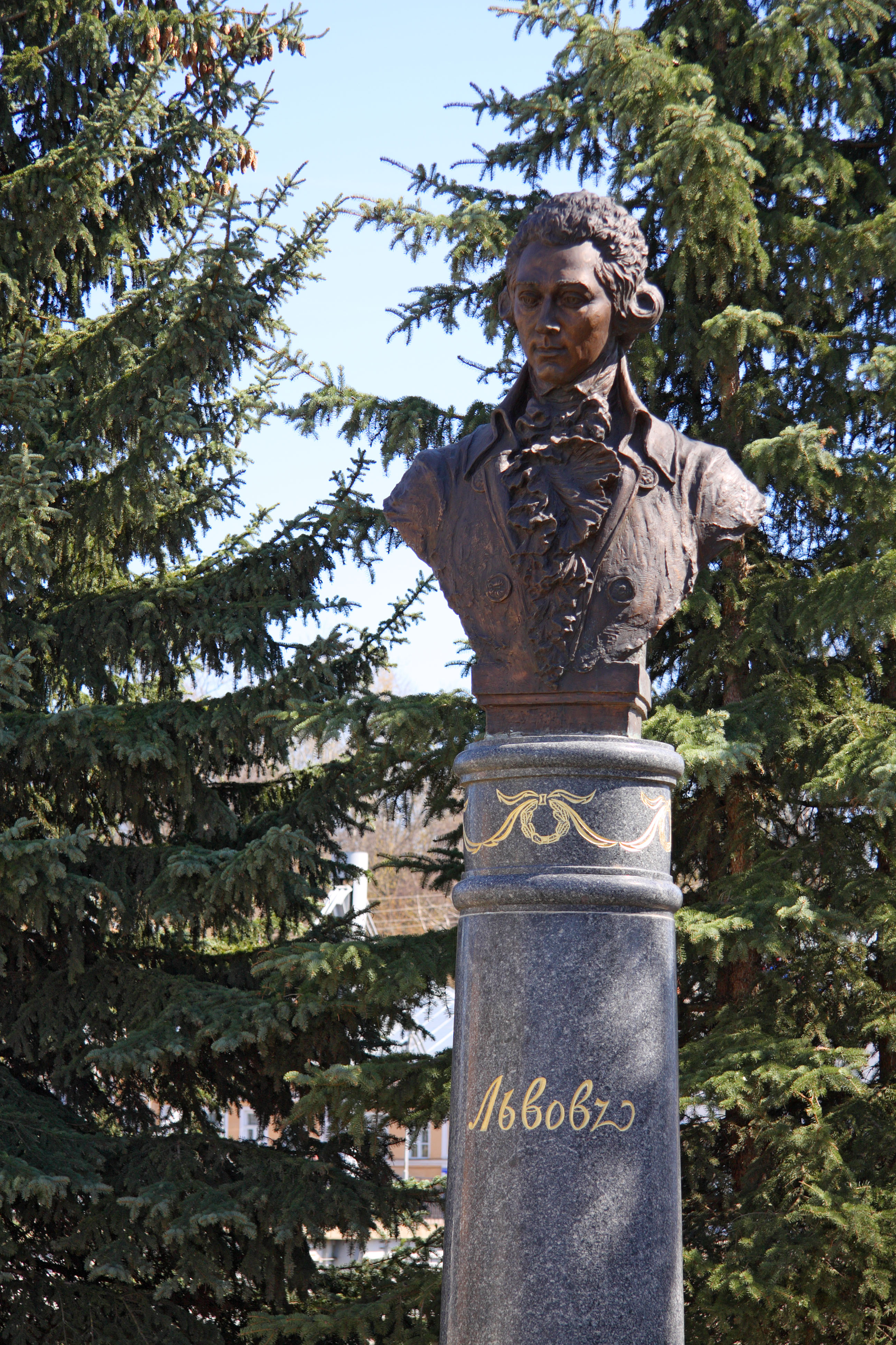 Lvov's monument in Torzhok